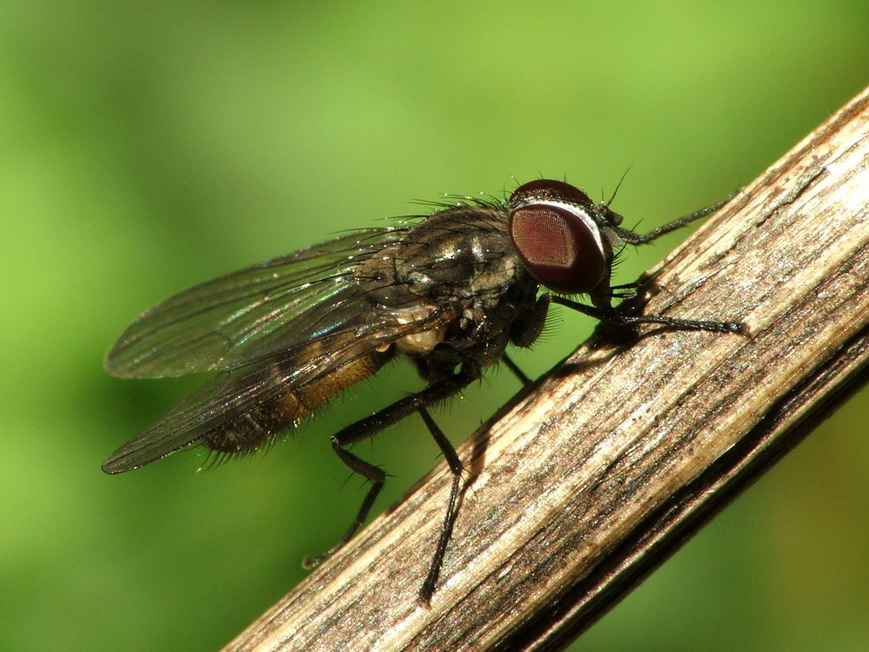 Fannia canicularis female